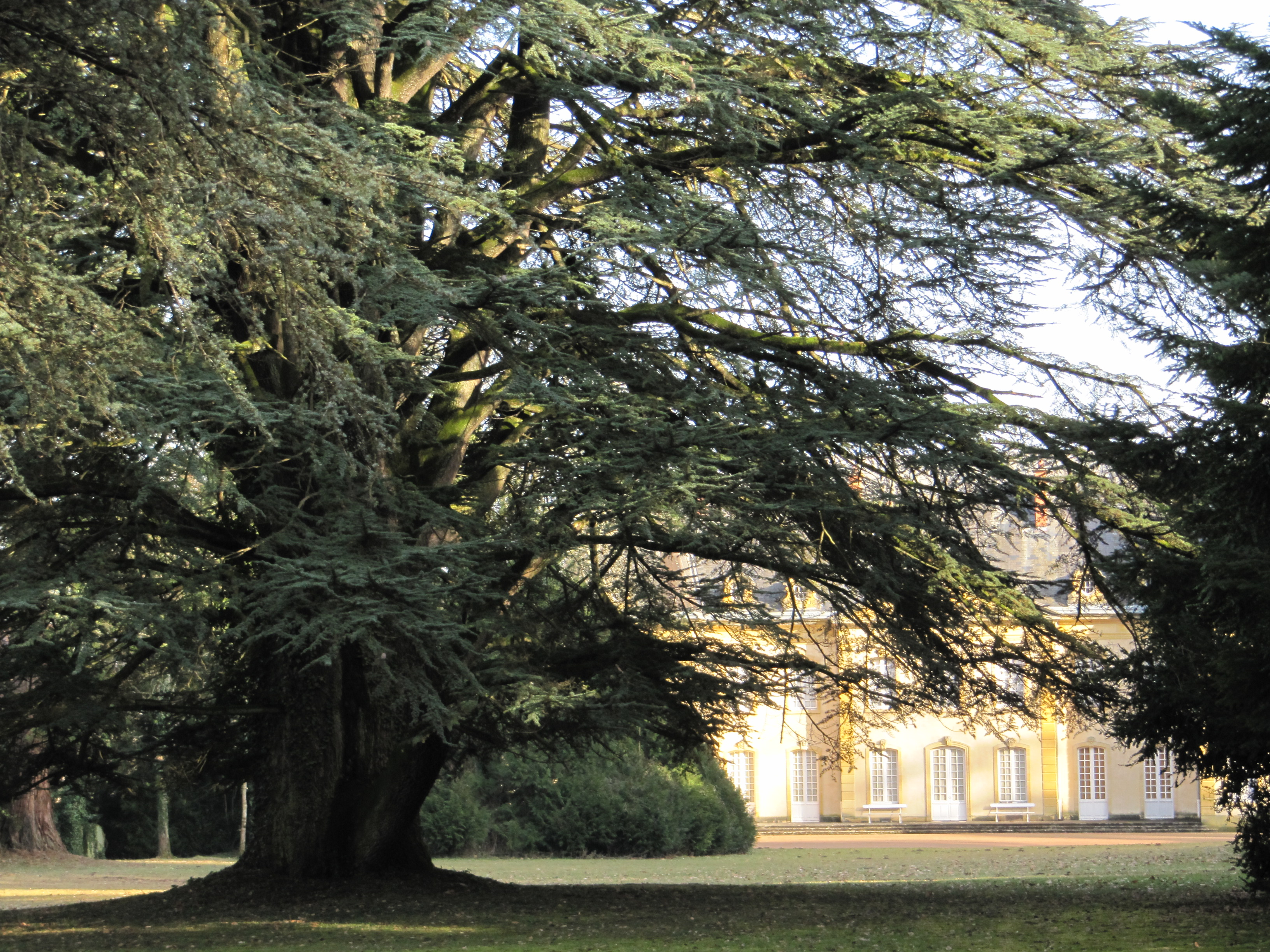 Chateau de Rambuteau, Bois-Sainte-Marie, Ozolles